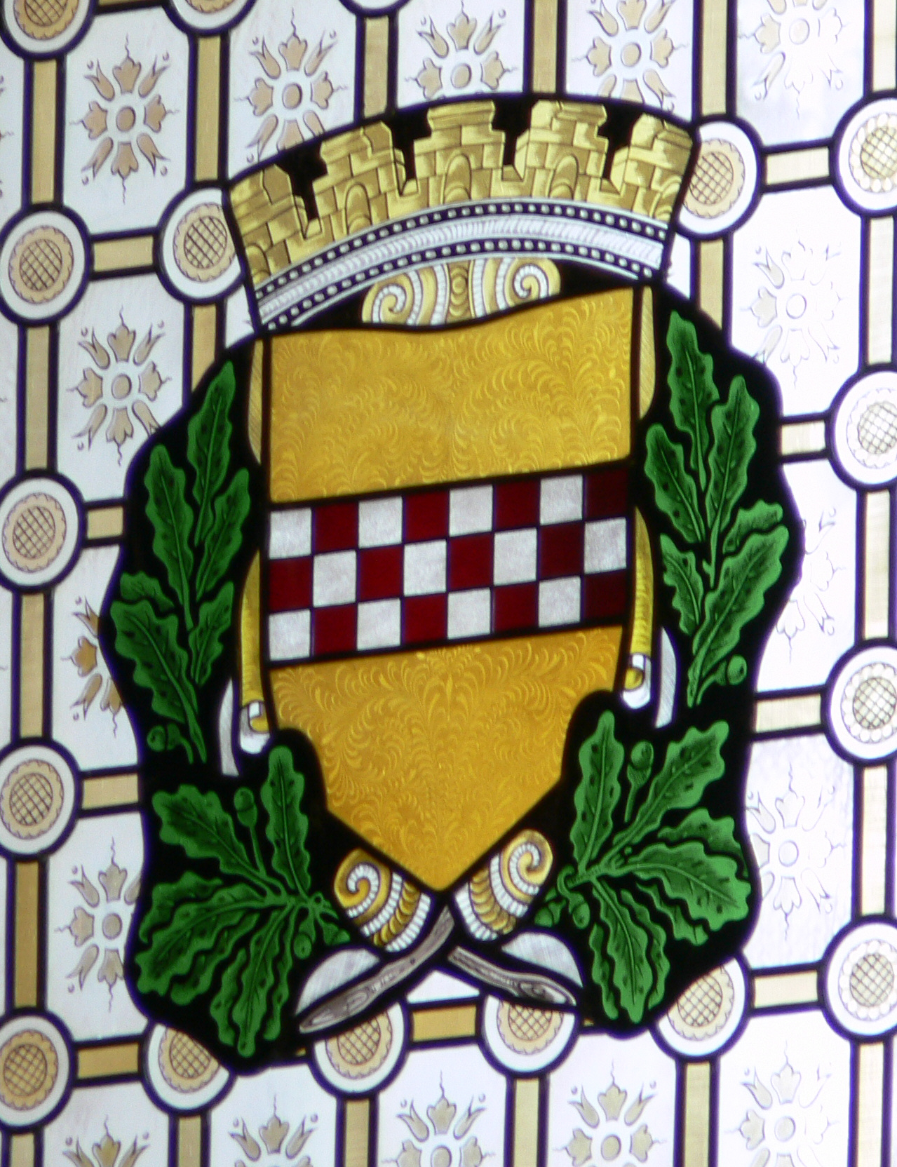 Leipzig, ReichsgerichtsgebäudeGroßer SitzungssaalFenster mit den Wappen der Städte, die Sitz eines Oberlandesgerichts waren Stadtwappen Hamm (Westfalen)